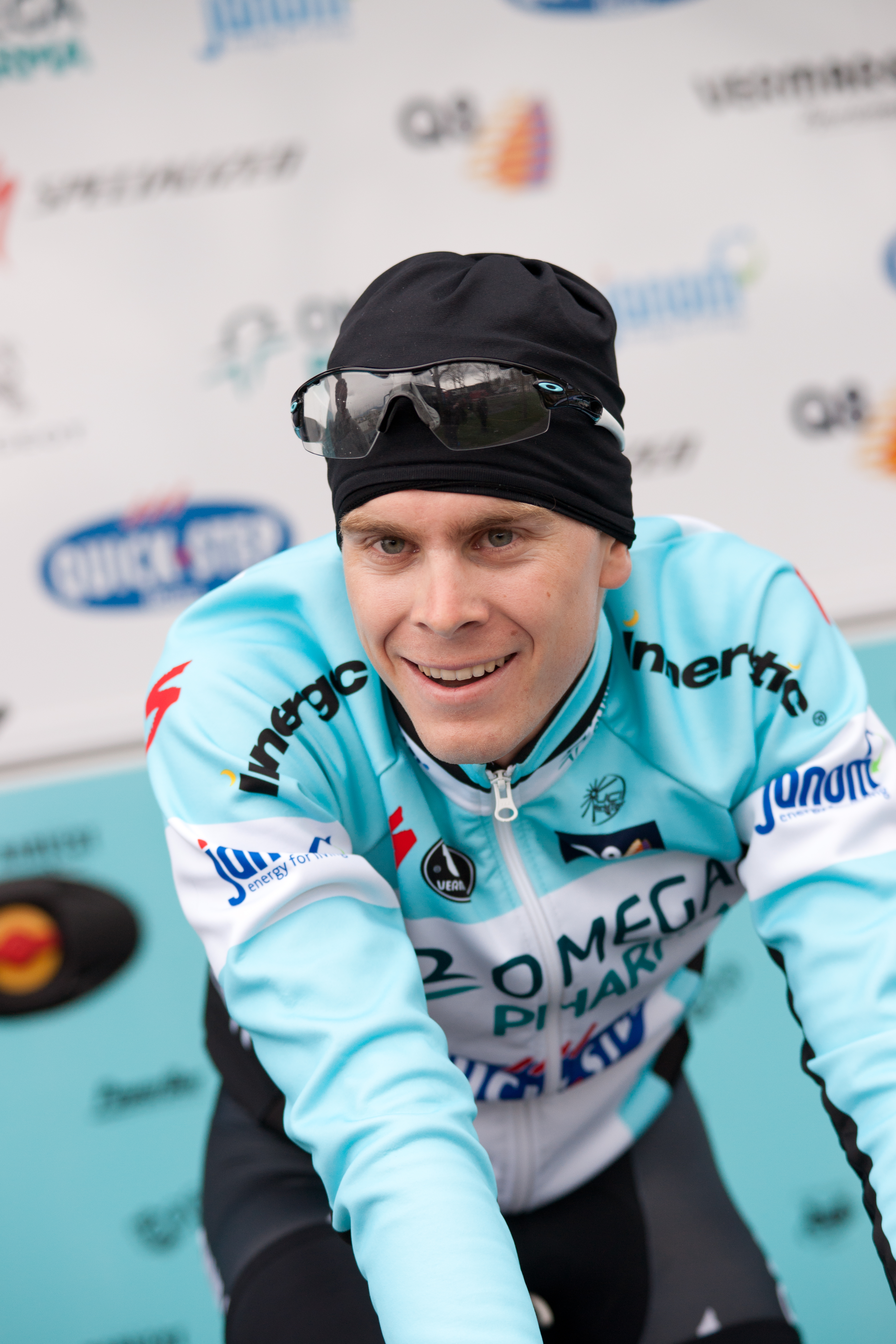 Julien Vermote à l'échauffement du prologue du Tour de Romandie 2012.